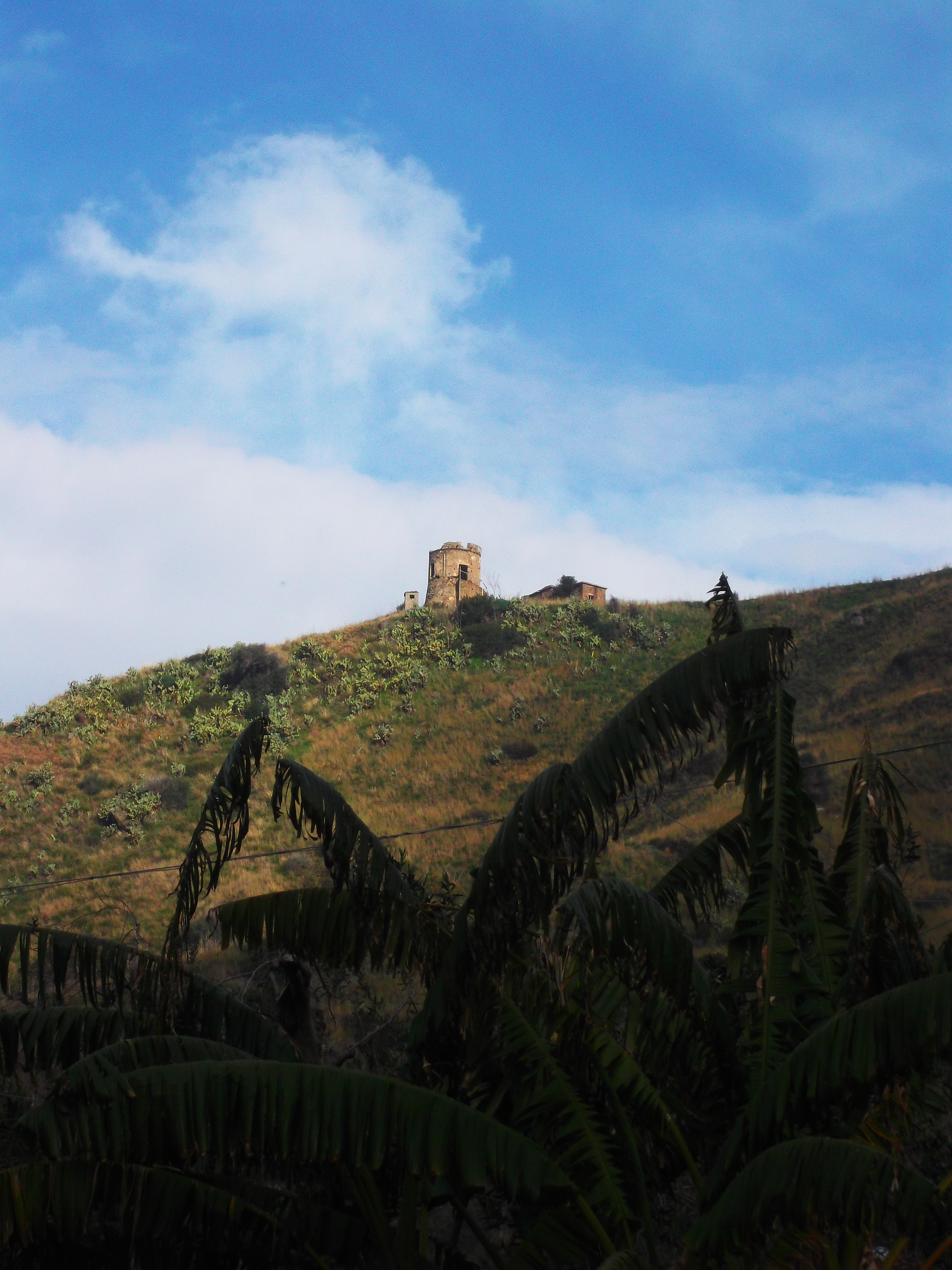 la "Turriella", Torre di Guardia arabo-normanna di Coreca vista dalla Piazza del centro cittadino